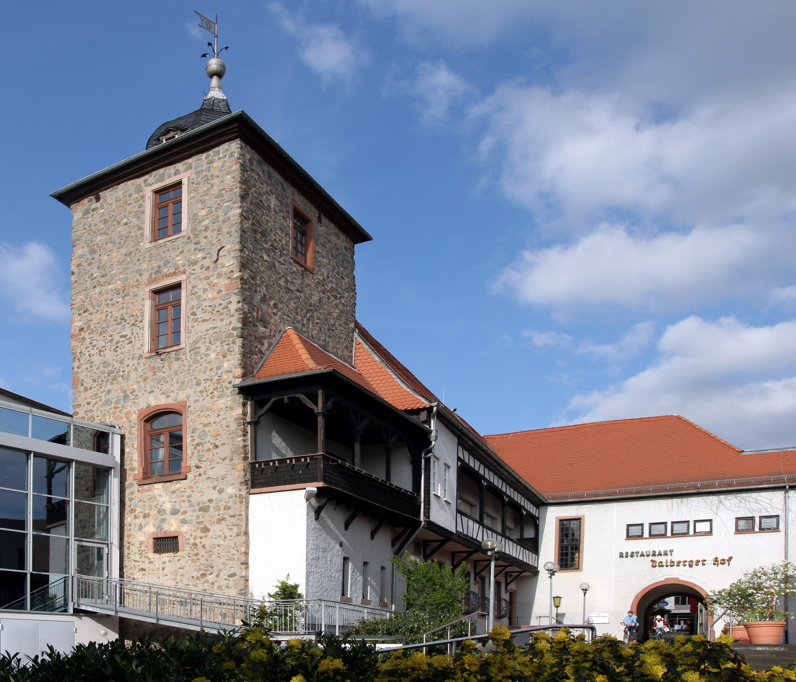 Der Dalberger Hof in Bensheim (Südhessen). Links davon das Parktheater und rechts das Bensheimer Bürgerhaus